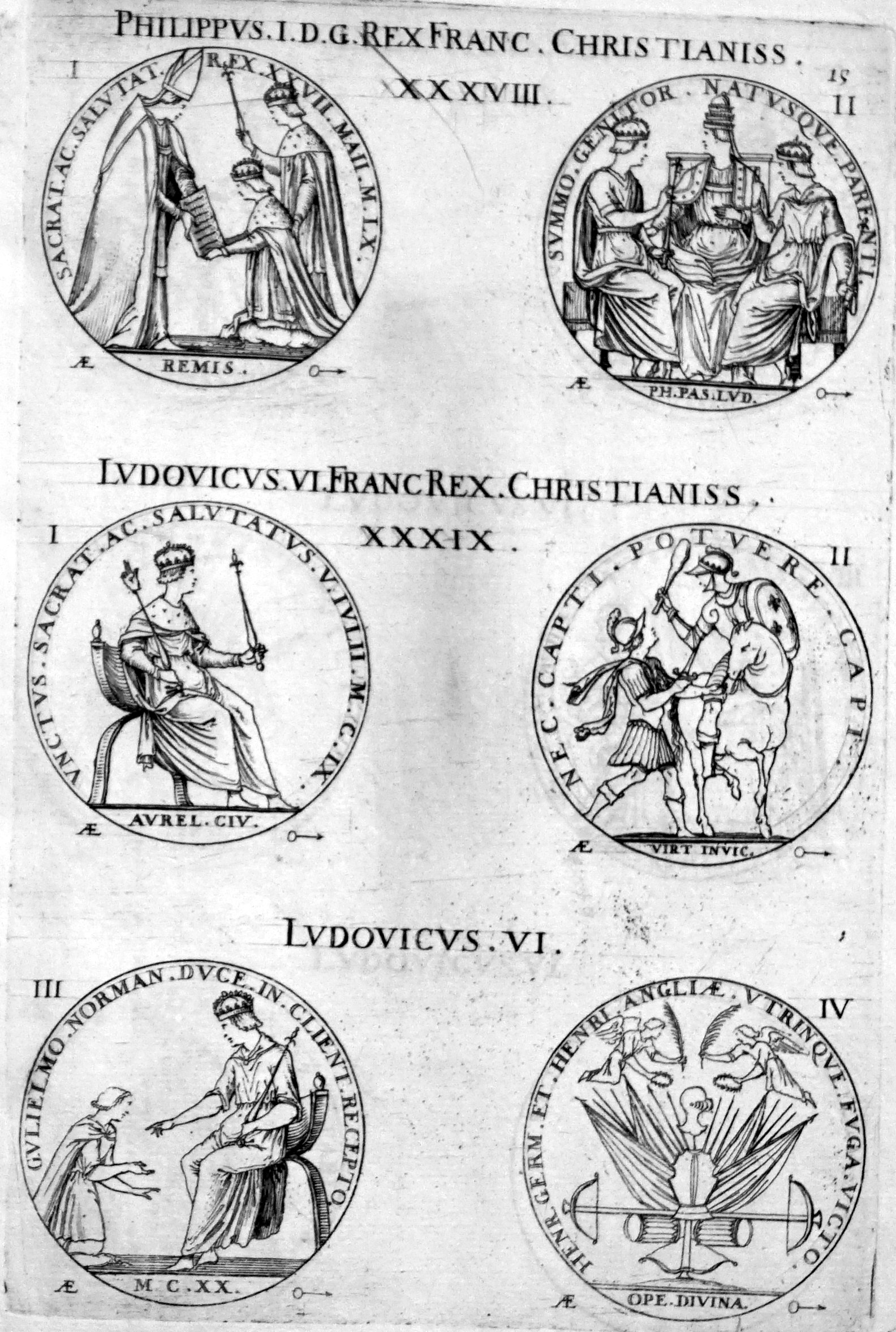 extrait du livre "la France métallique...". Ecrit par Jacques de Bie et publié par Jean Camusat.